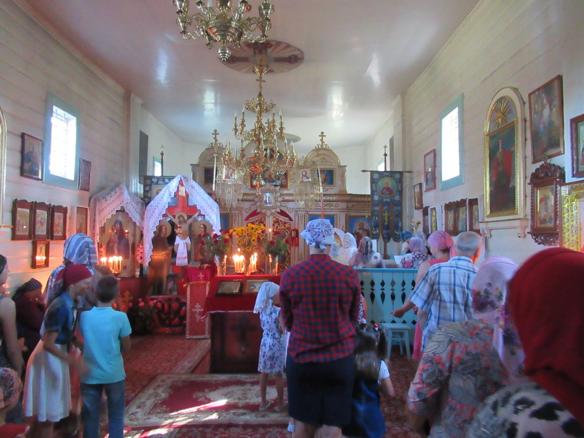 Лелікава. Царква